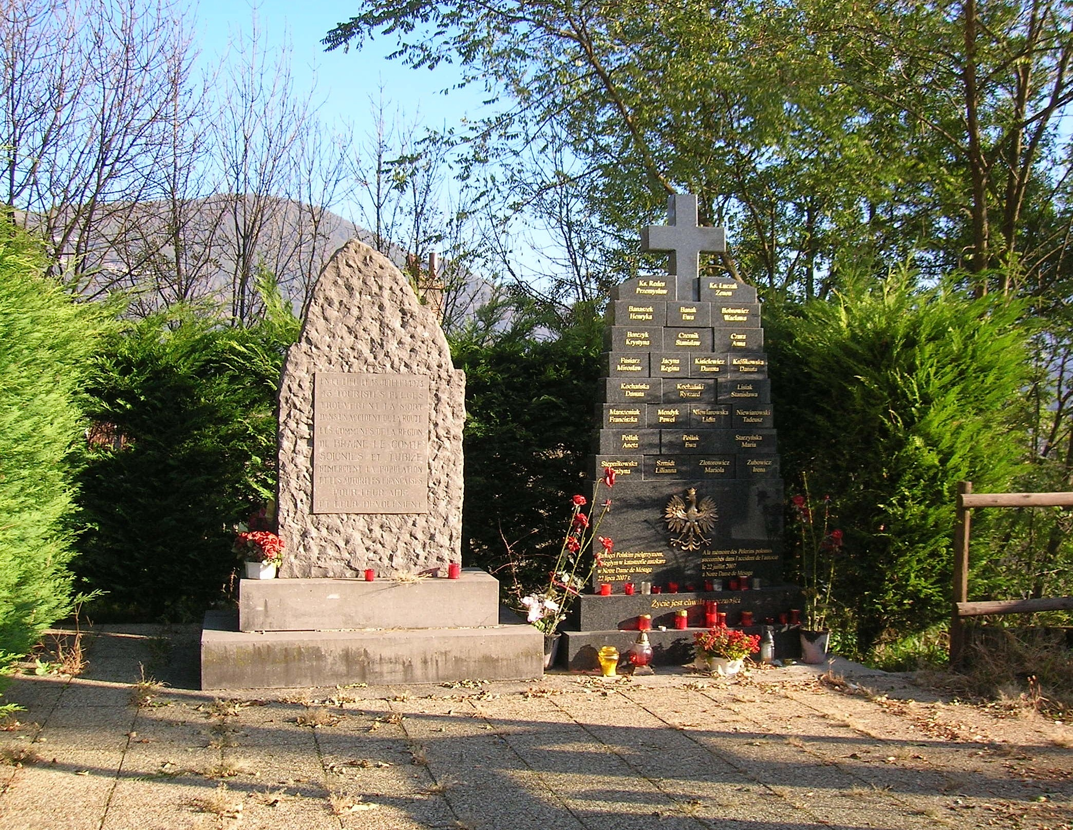 monument aux morts, Notre-Dame-de-Mésage, Isère, France.